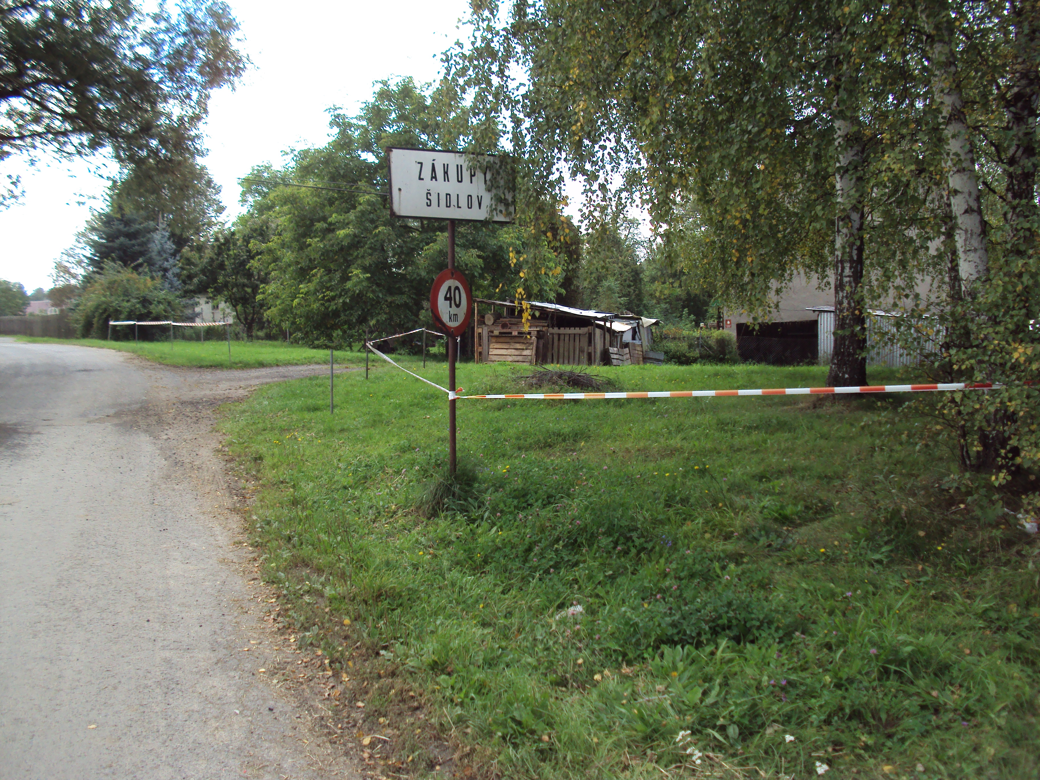 Záběr z obce Šidlov u Zákup, část Nový Šidlov